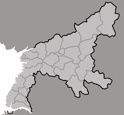 Map of Pyongan-namdo, DPRK, 2006